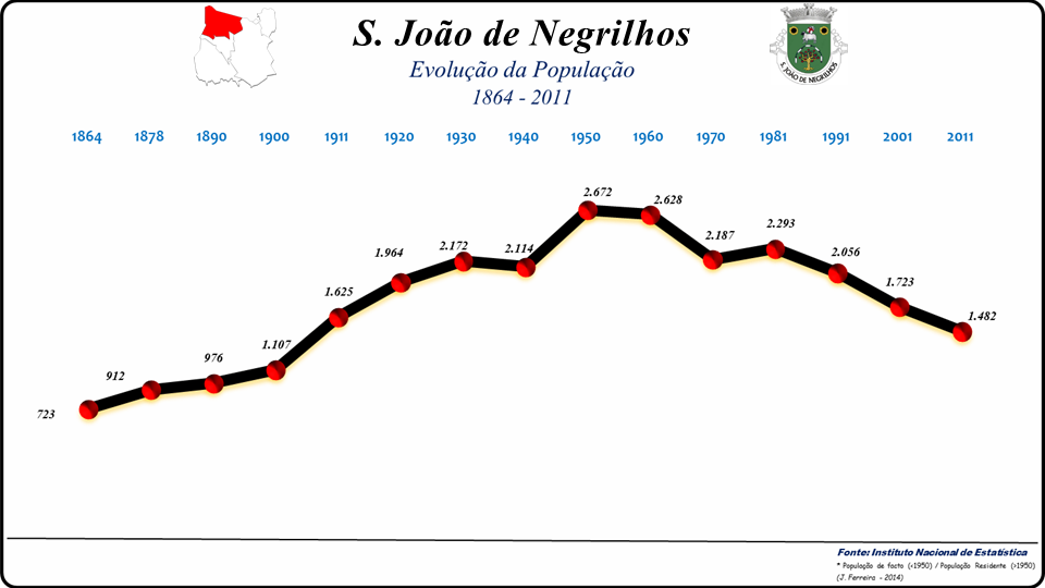 Evolução da População